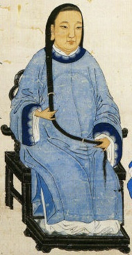 鄭成功王妃董氏